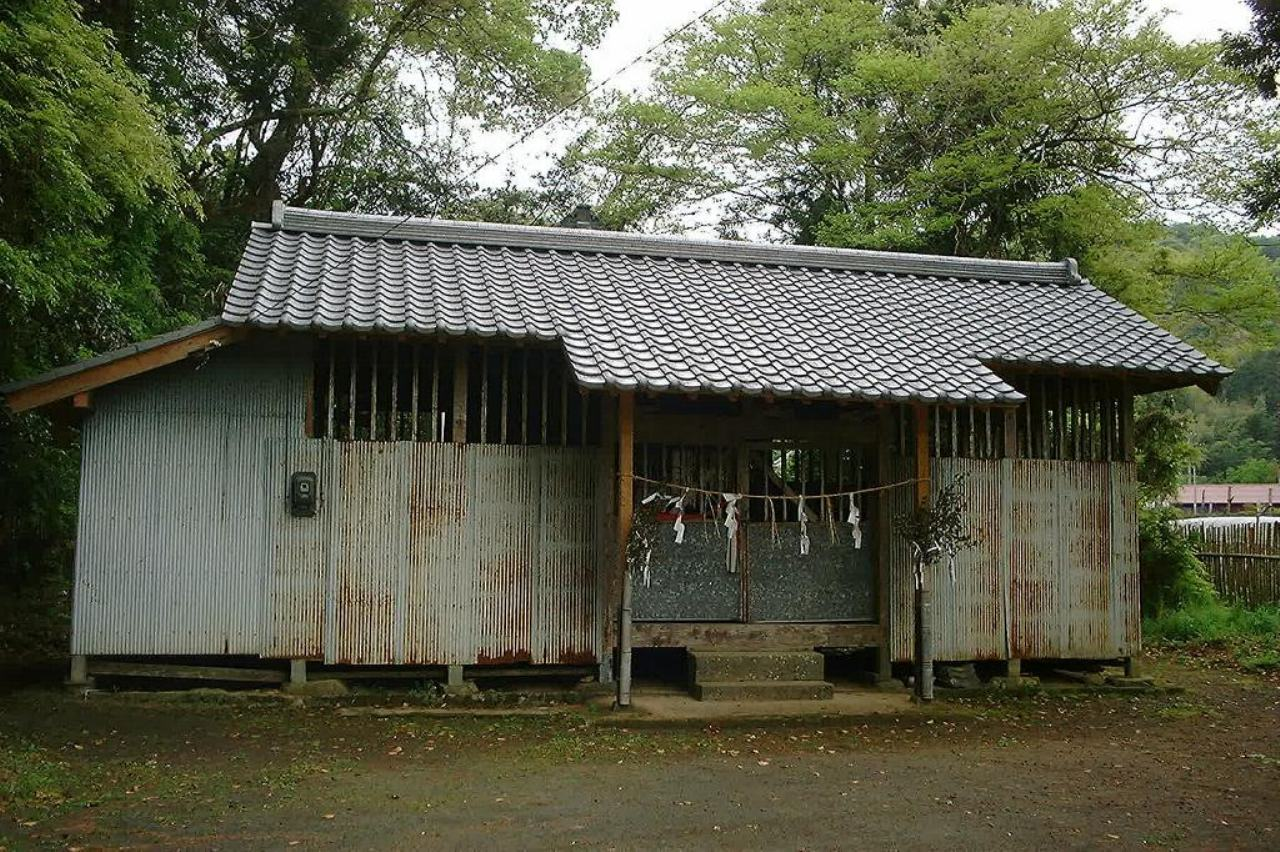 花山神社は花山法皇を祀る